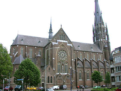 St Lambertus church, Veghel